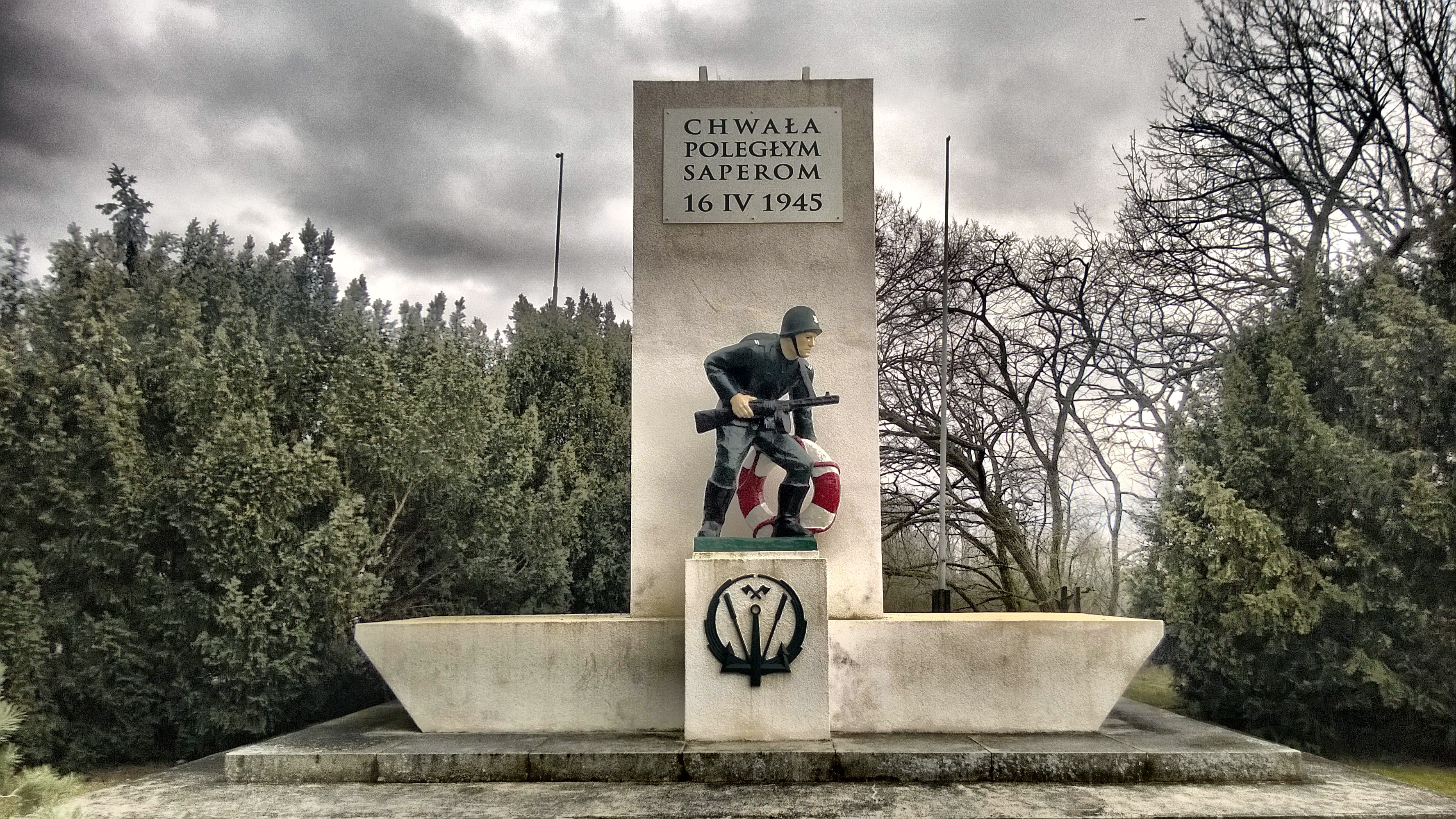 Gozdowice, Poland